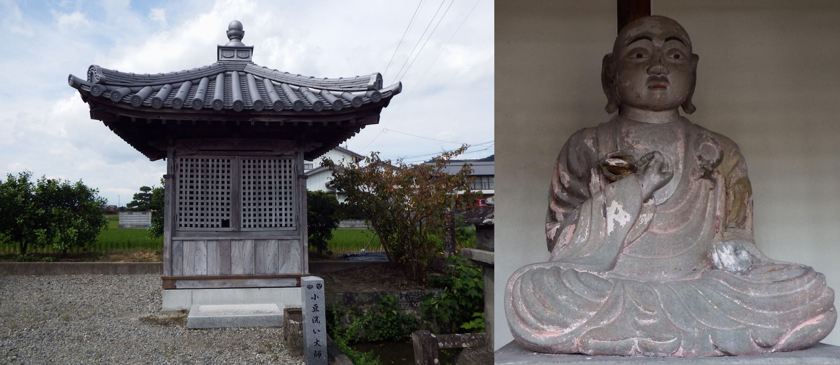 小豆洗大師